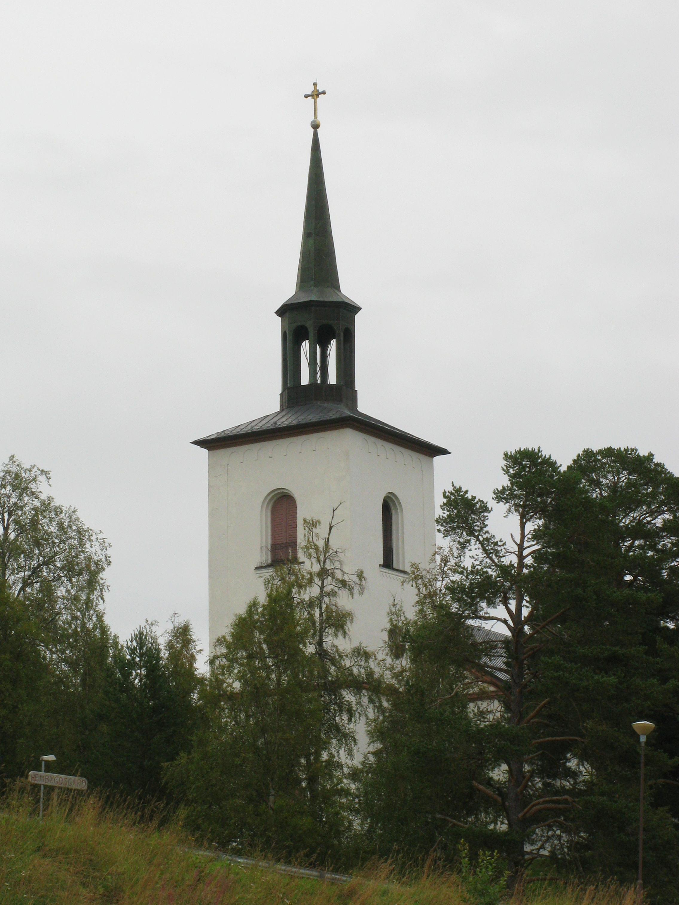 Undersåkers kyrka sedd från E14.